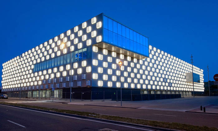 Vistas desde el exterior del Pabellón Navarra Arena